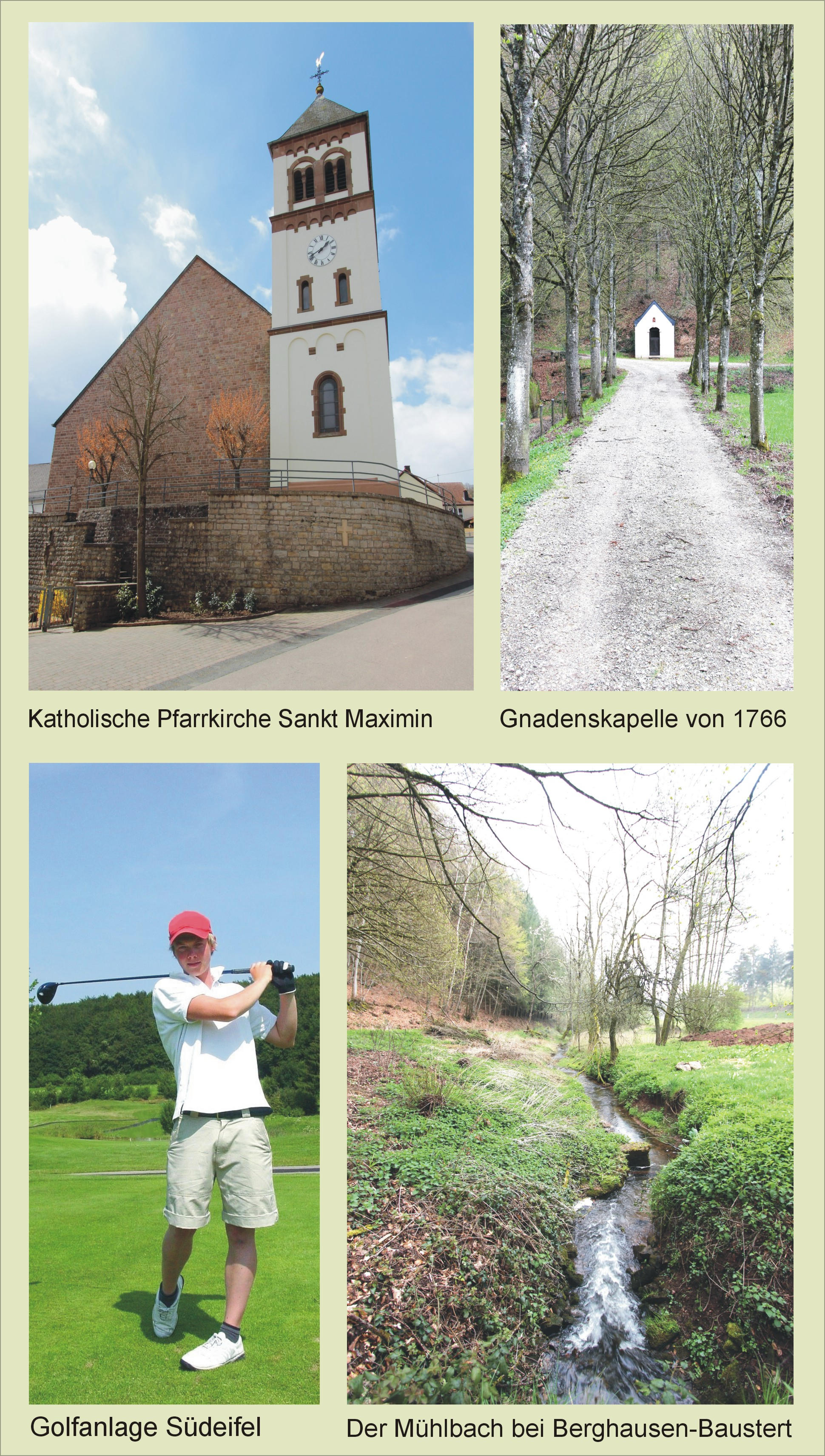 Entdecken Sie das Eifelland Baustert